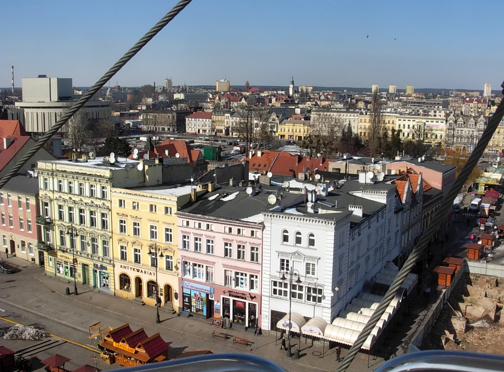 Stare Miasto w Bydgoszczy, fragment Starego Rynku